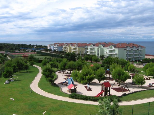 Skipper Residence, Savudrija